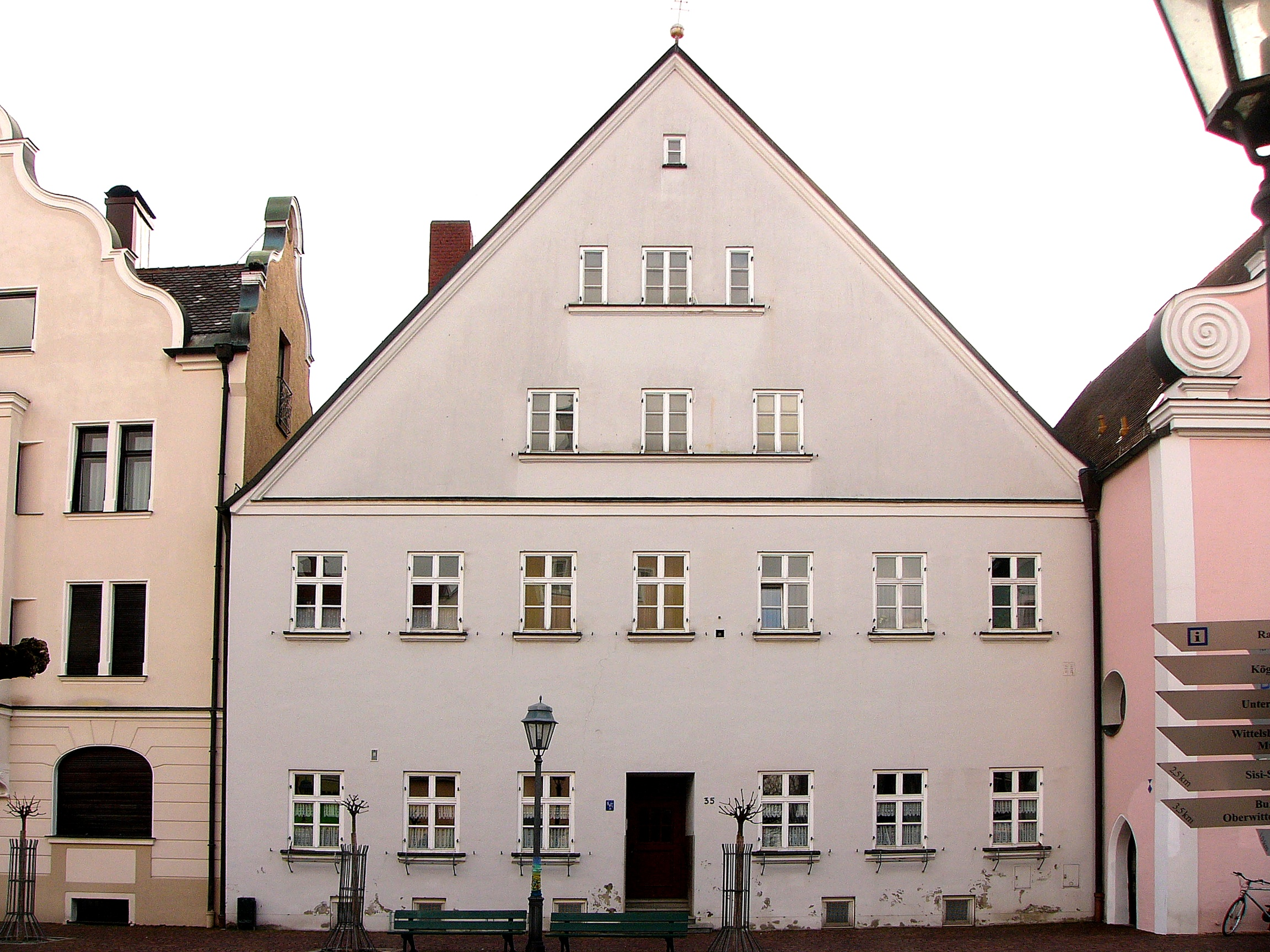 Ehemaliges Spital; stattlicher zweigeschossiger Giebelbau mit Satteldach, Mitte 17. Jahrhundert, Fassade vielfach erneuert. This is a photograph of an architectural monument.